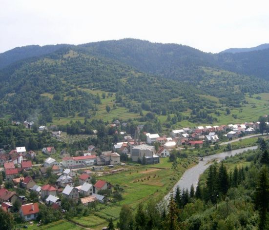 Zborov nad Bystricou, Slovakian vilage